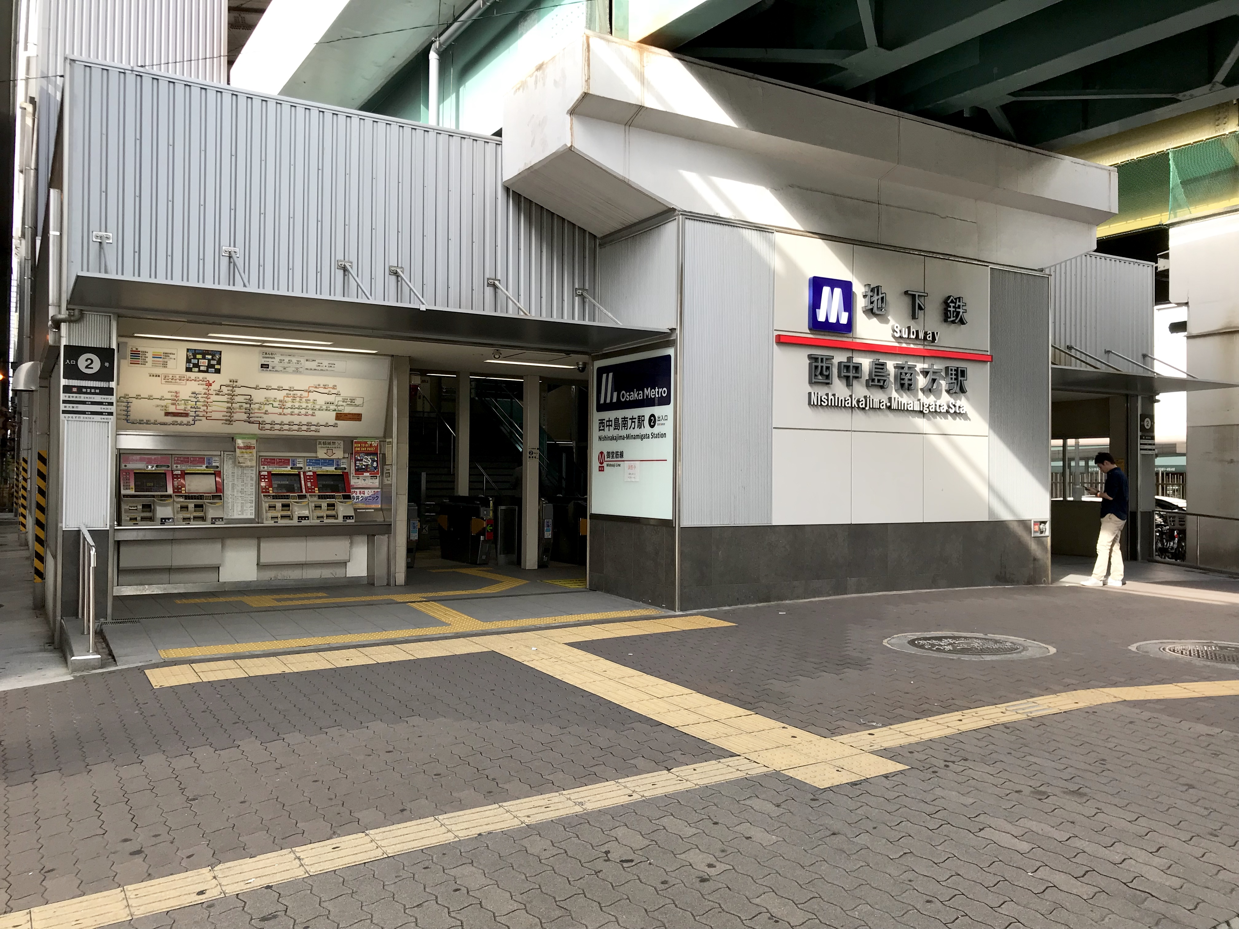 Osaka Metro西中島南方駅南口（2号出入口）